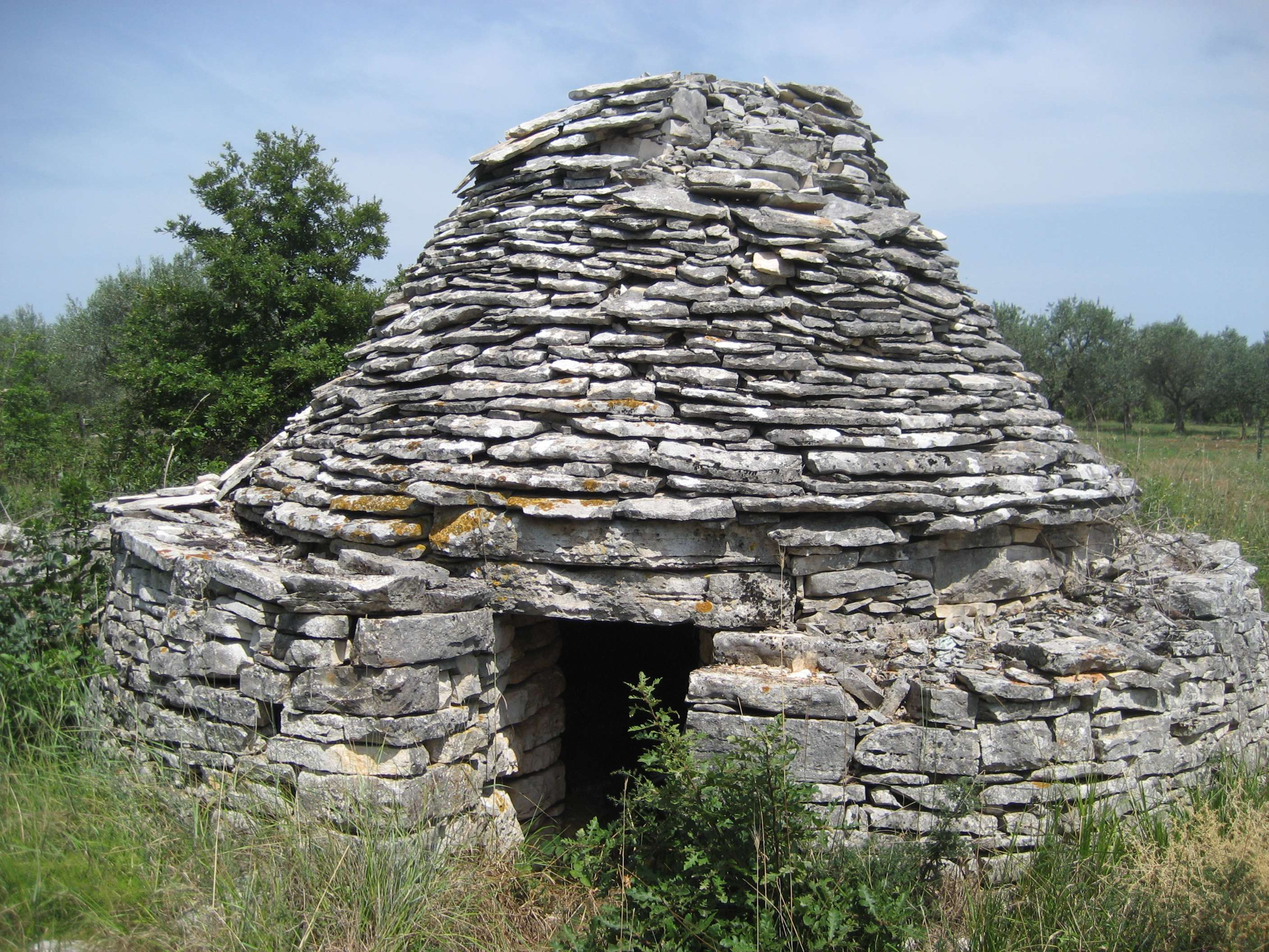 Kazun, Trockenmauer-Unterstand, Kroatien